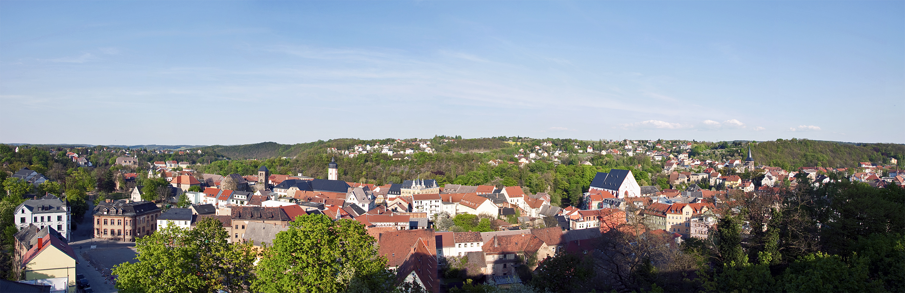 Blick über Weida mit Peterskirche, Rathaus, St. Marienkirche und Widenkirche